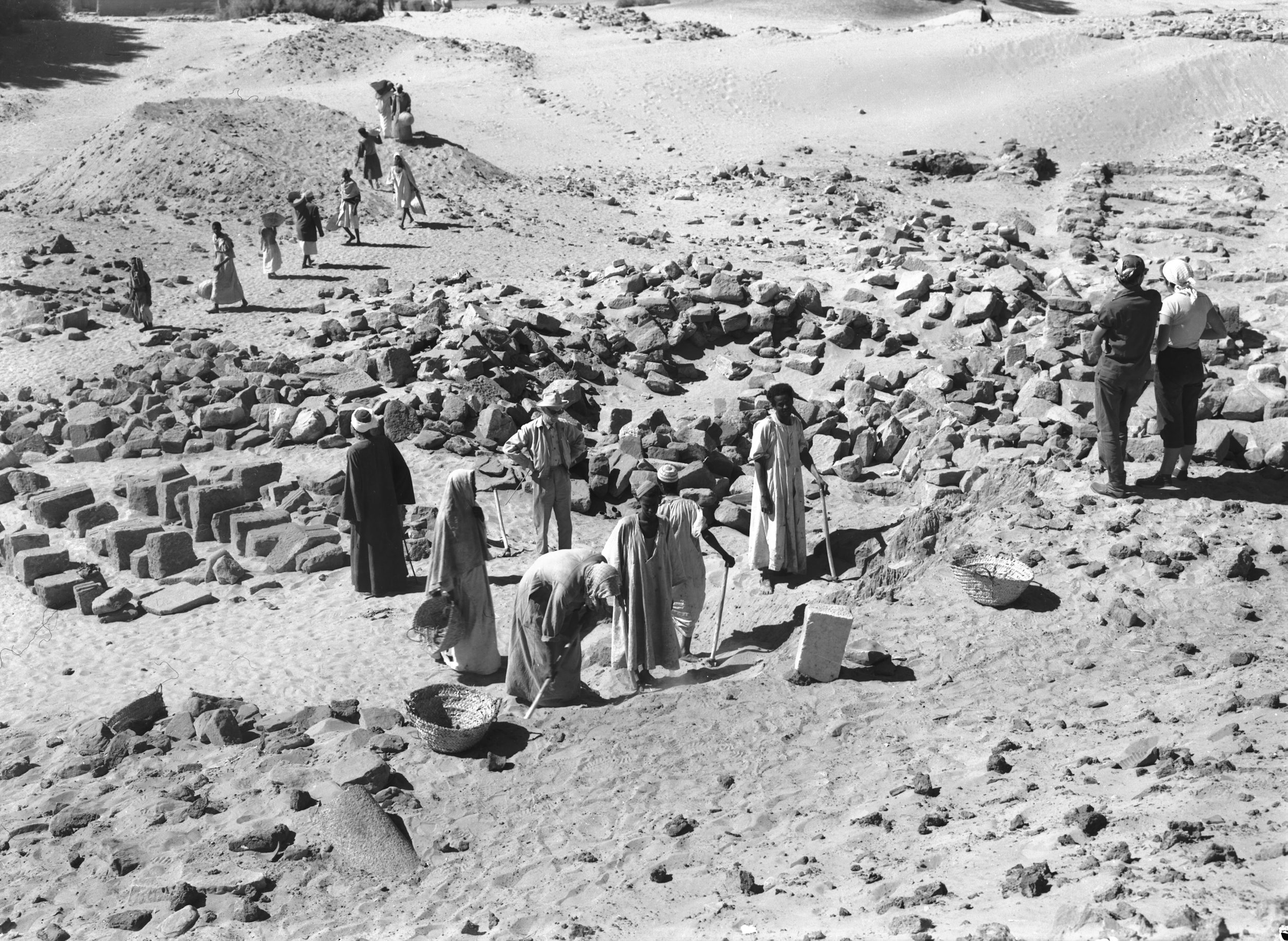 Wykopaliska w Faras